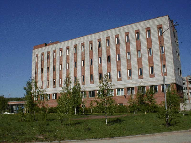 Узел электросвязи (Кирово-Чепецк)